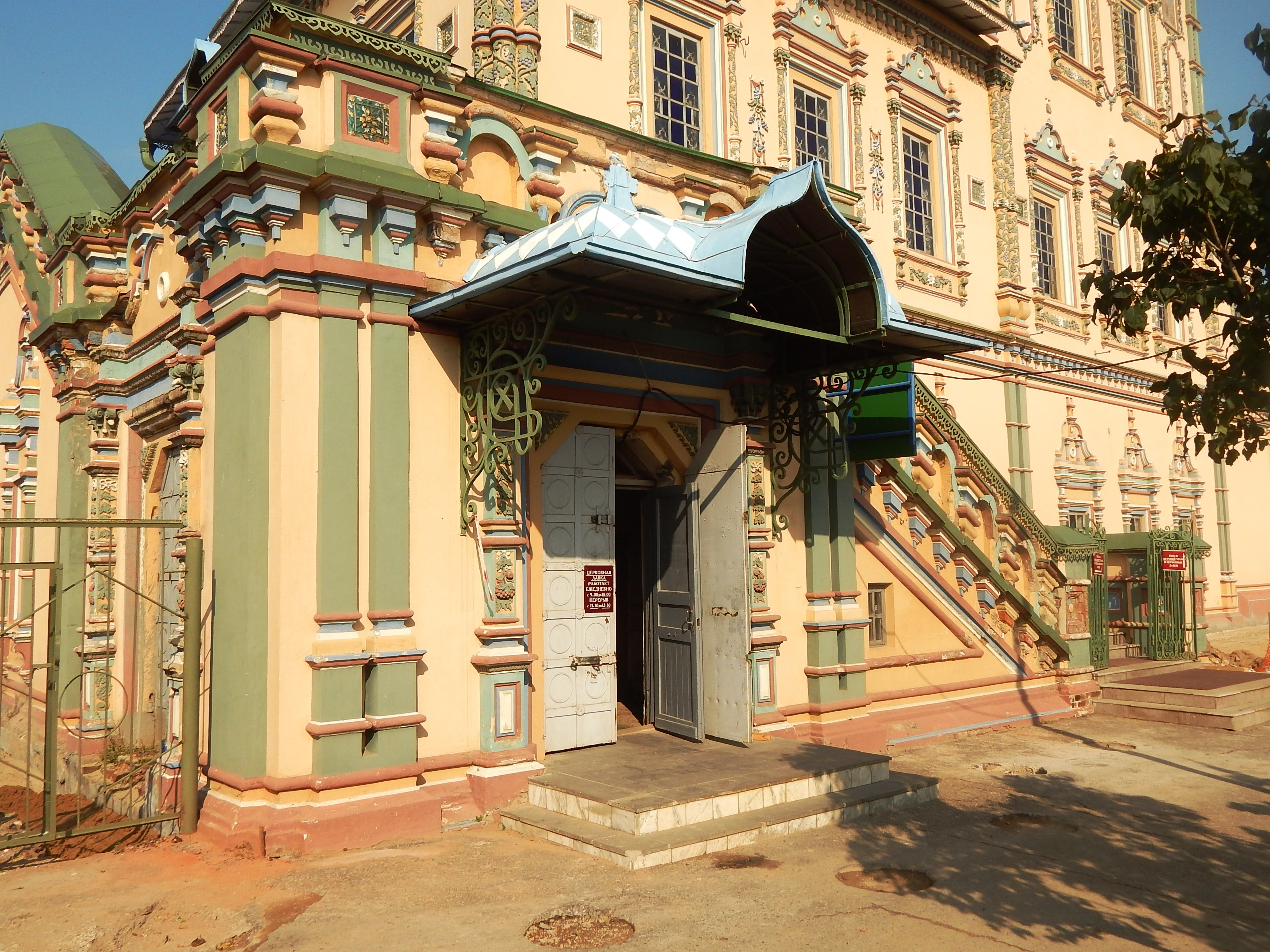 Собор: улица Мусы Джалиля, 21, Казань, Татарстан